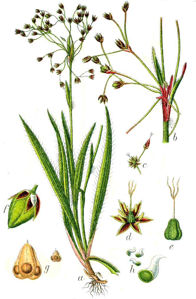 Luzula pilosa (L.) Willd. Original Caption Frühe Hainsimse, Luzula pilosa